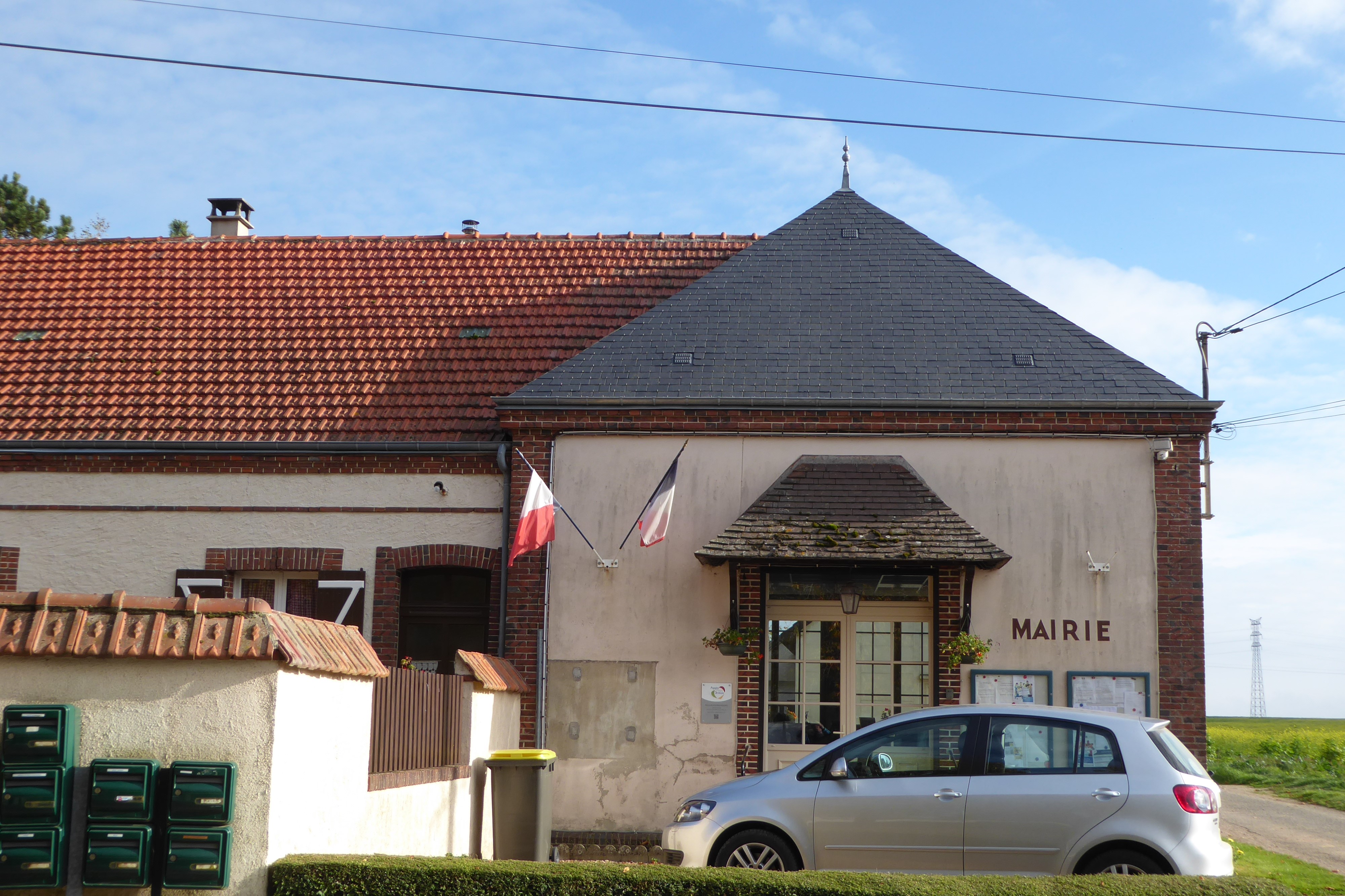 mairie, le Boullay-les-Deux-Églises, Eure-et-Loir, France.